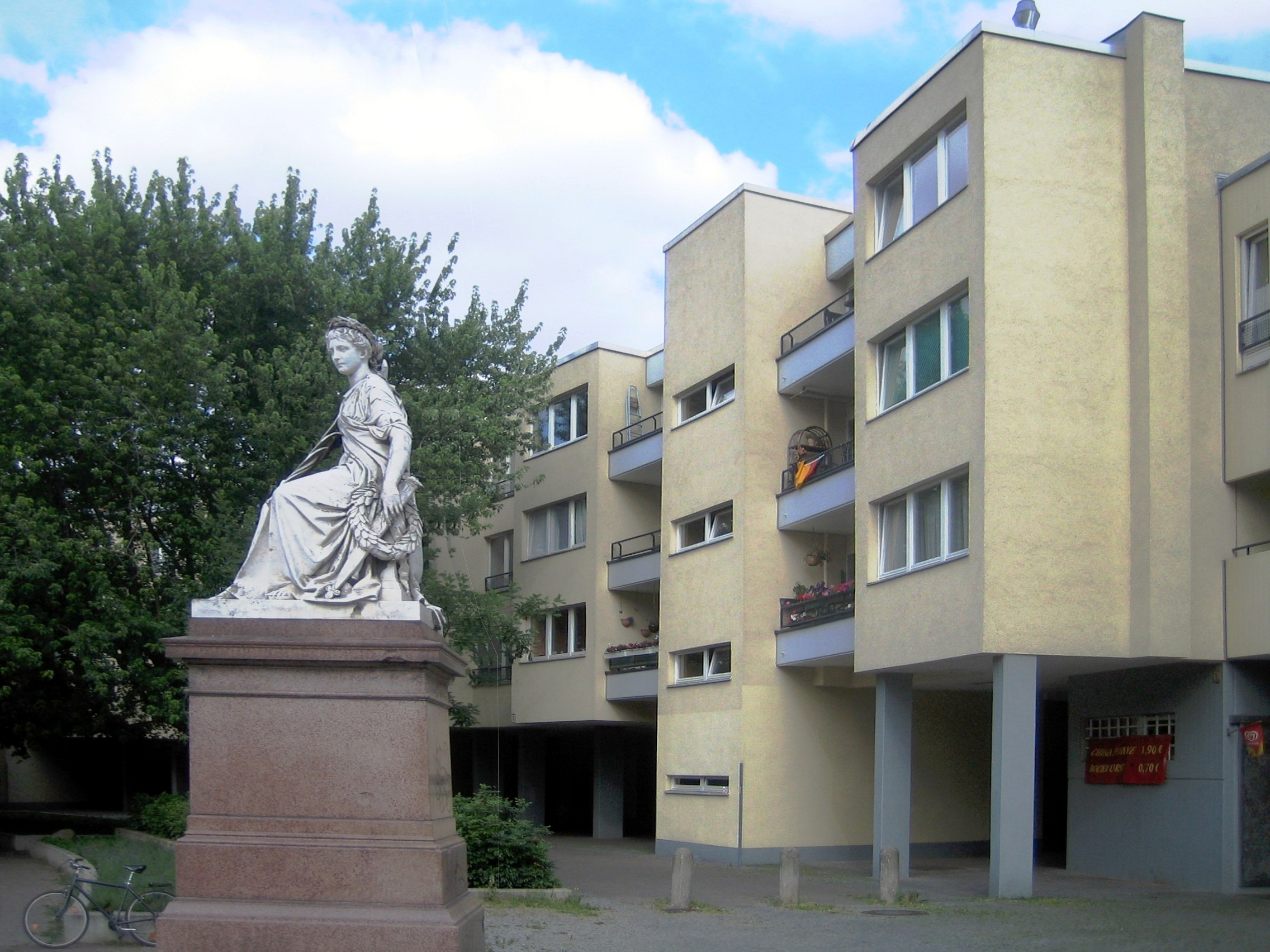 Berlin, Mehringplatz. Detail. Der Friede (1879) von Albert Wolff